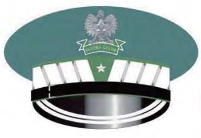 Czapka garnizonowa nadinspektora celnego